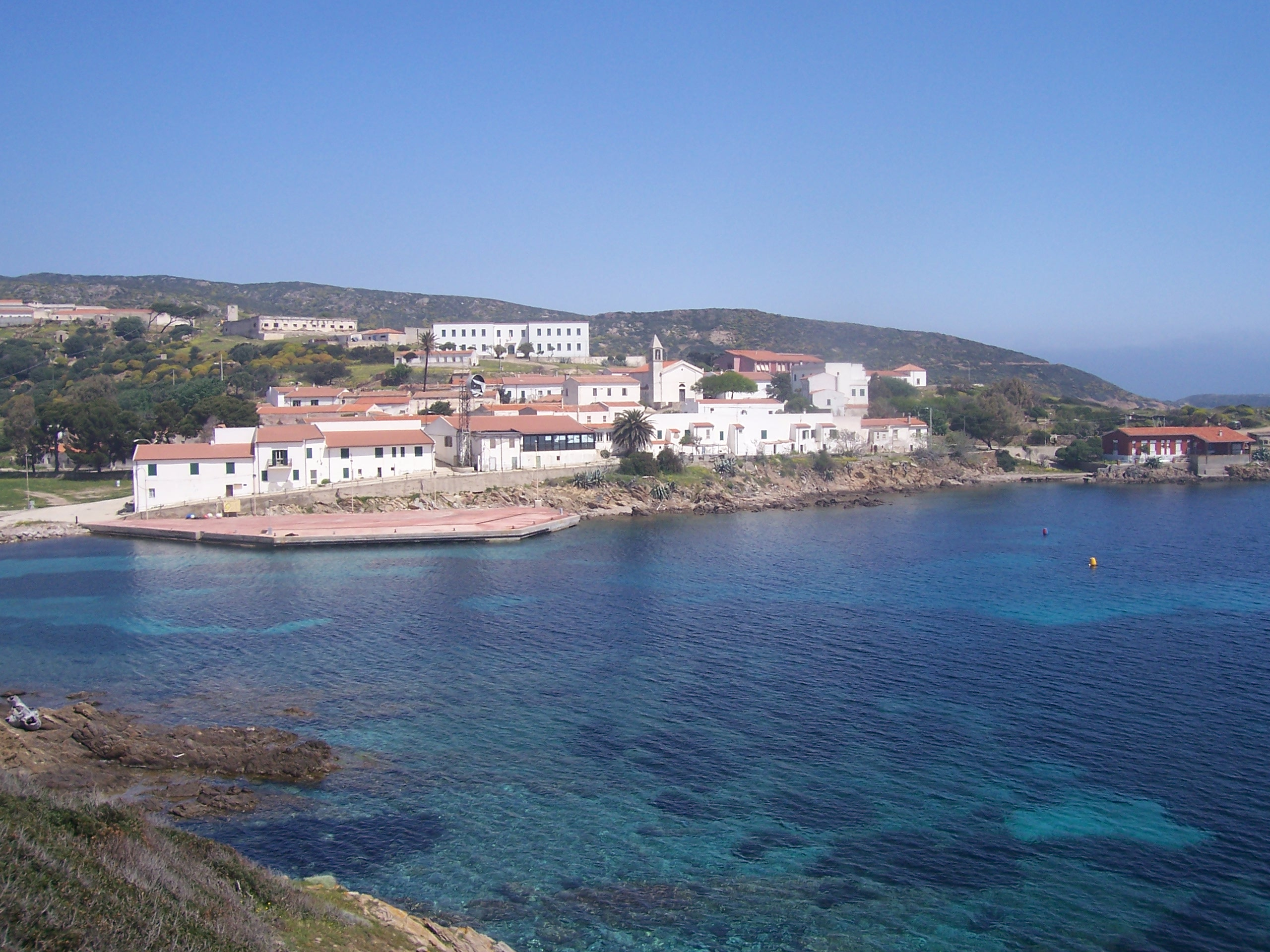 Cala d'Oliva - Landscape